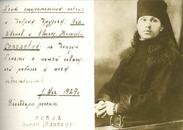 Монах Пимен 1 мая 1929 года